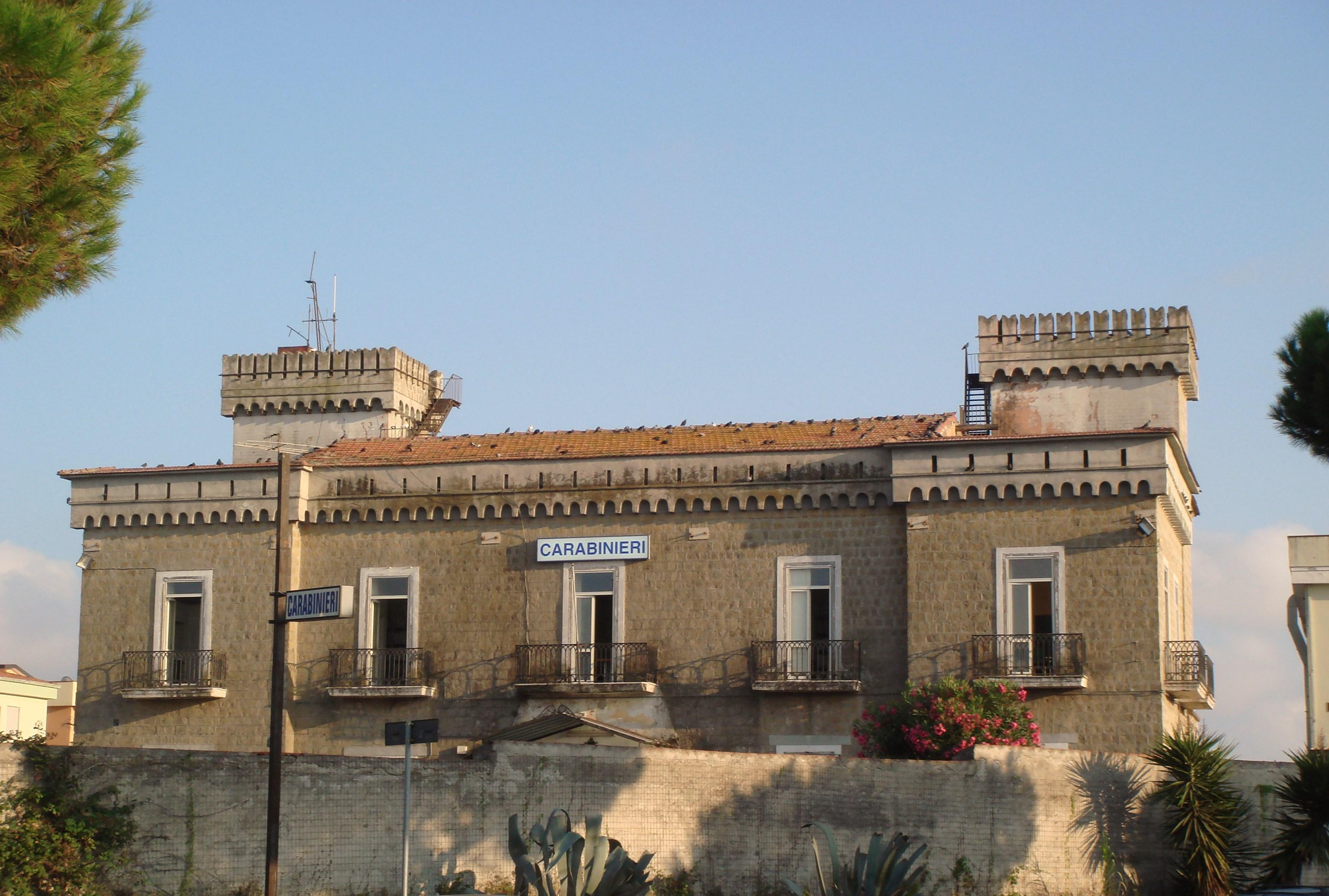 Villa De Blasio adibita a sede del Comune e Stazione dei Carabinieri di Lago Patria